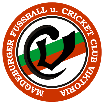 Logo des FuCC Cricket-Viktoria 1897 Magdeburg